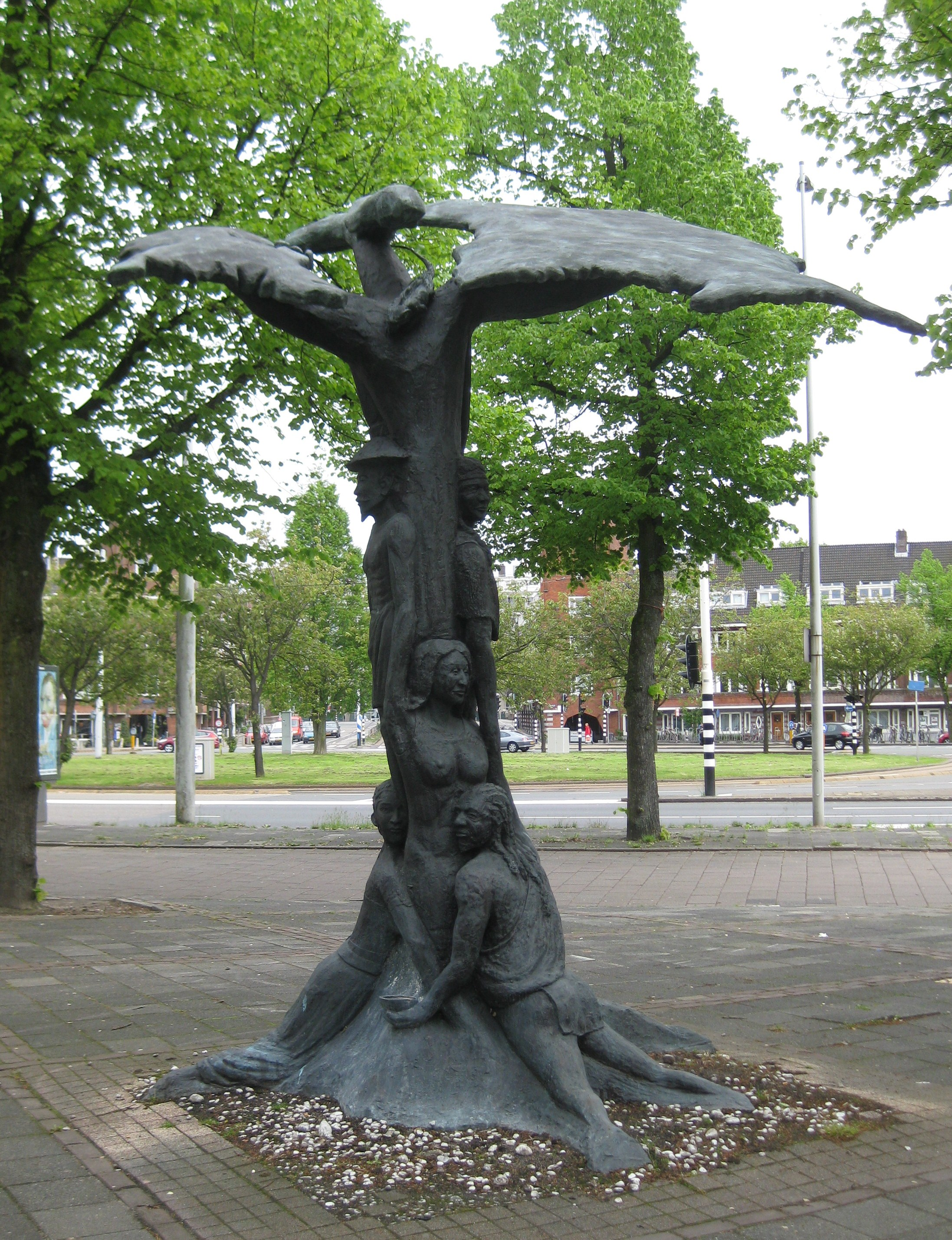 Monument van besef of Levensboom van Henry Renfurm, 2003, gemaakt om de bewustwording van het gezamelijke verleden van Suriname, de Nederlandse Antillen en Nederland te bevorderen. Surinameplein Amsterdam